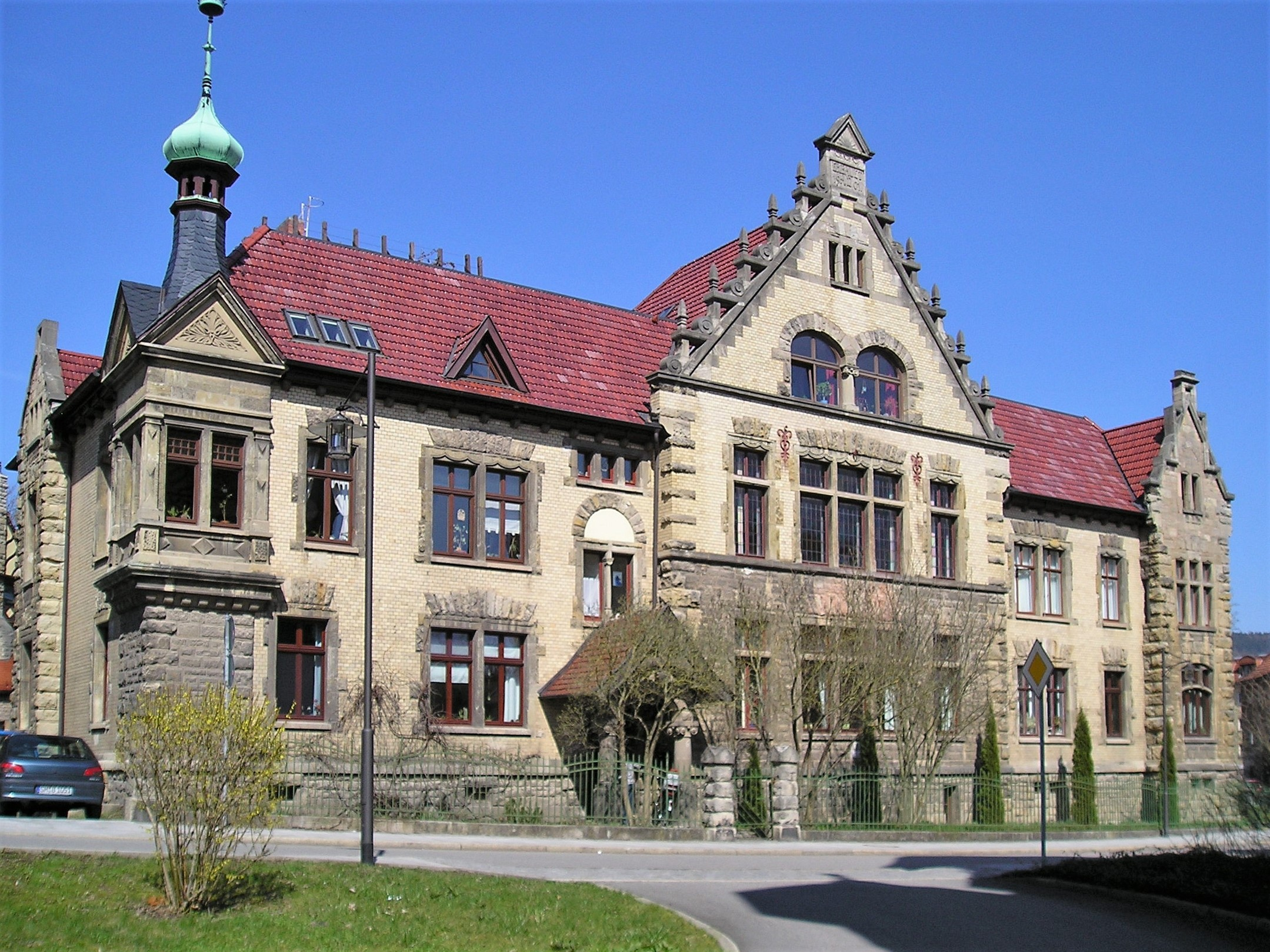 Große denkmalgeschützte Stadtvilla in der Innenstadt von Meiningen, Gemeindehaus der evangelischen Kirchengemeinde.